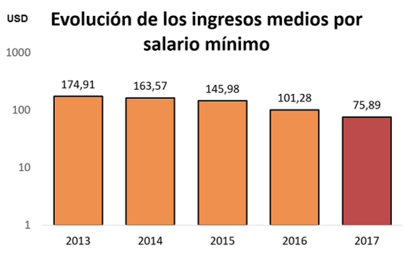 Ingresos por salario mínimo versión mejorada